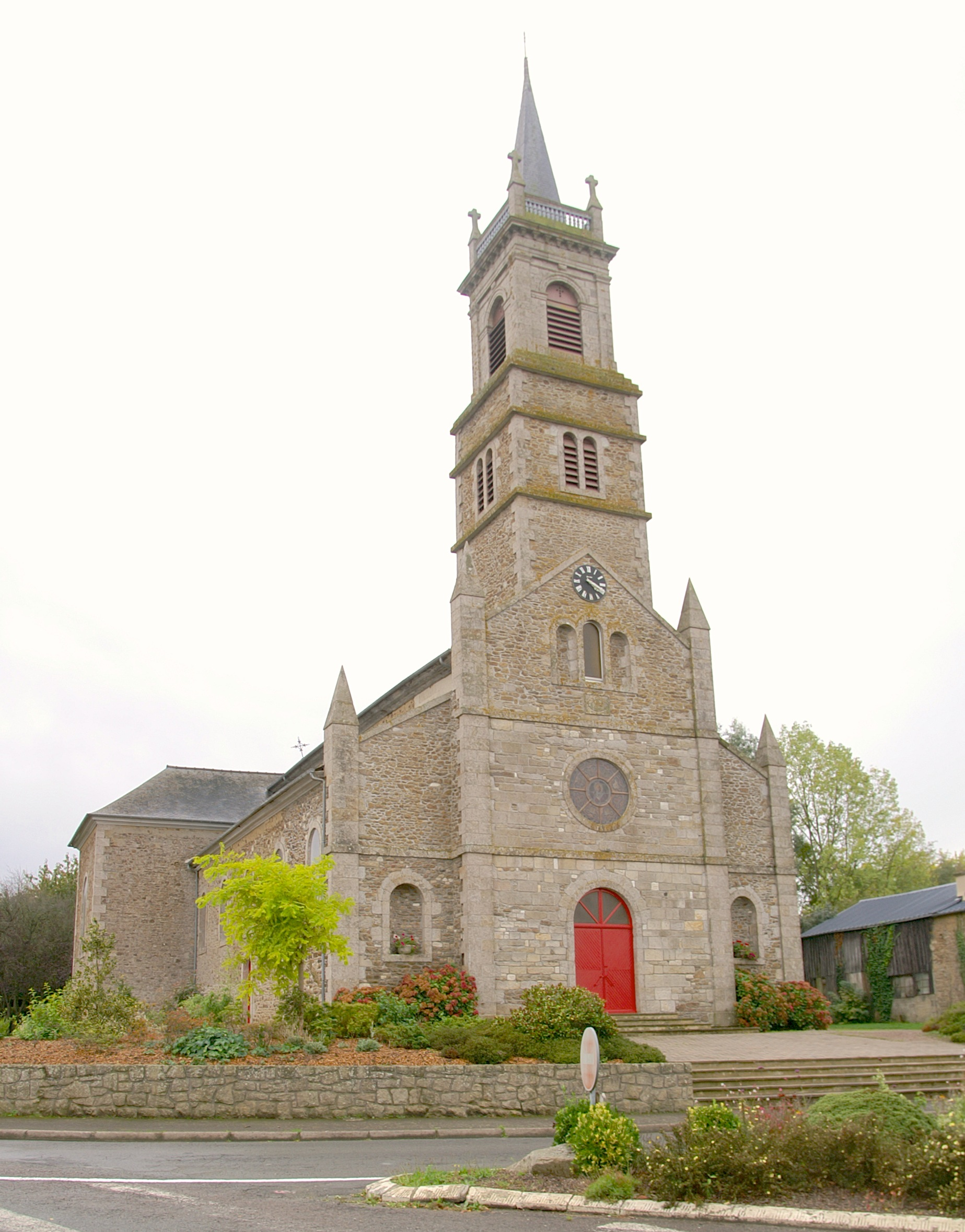 Église Saint-Jacques de Languenan.